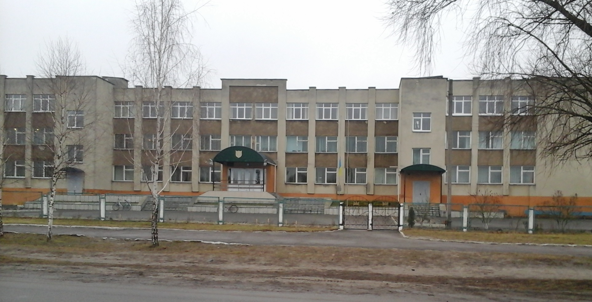 Дубровицький НВК, Рівненська область, Україна